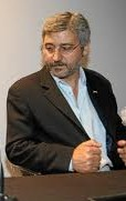 Antonio Robles junto a Rosa Diez